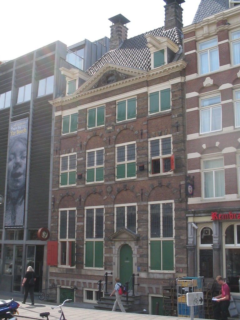 Rembrandthuis (Amsterdam, Netherlands), july 2005